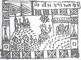 Ilustración del códice Rohonczi en la que aparece un hombre arrodillado presentanado una especie de orbe a un grupo de personas, seguido de otros dos hombres llevando objetos rematadados por cruces. Al fondo se ve una ciudad con torres rematadas por símbolos.